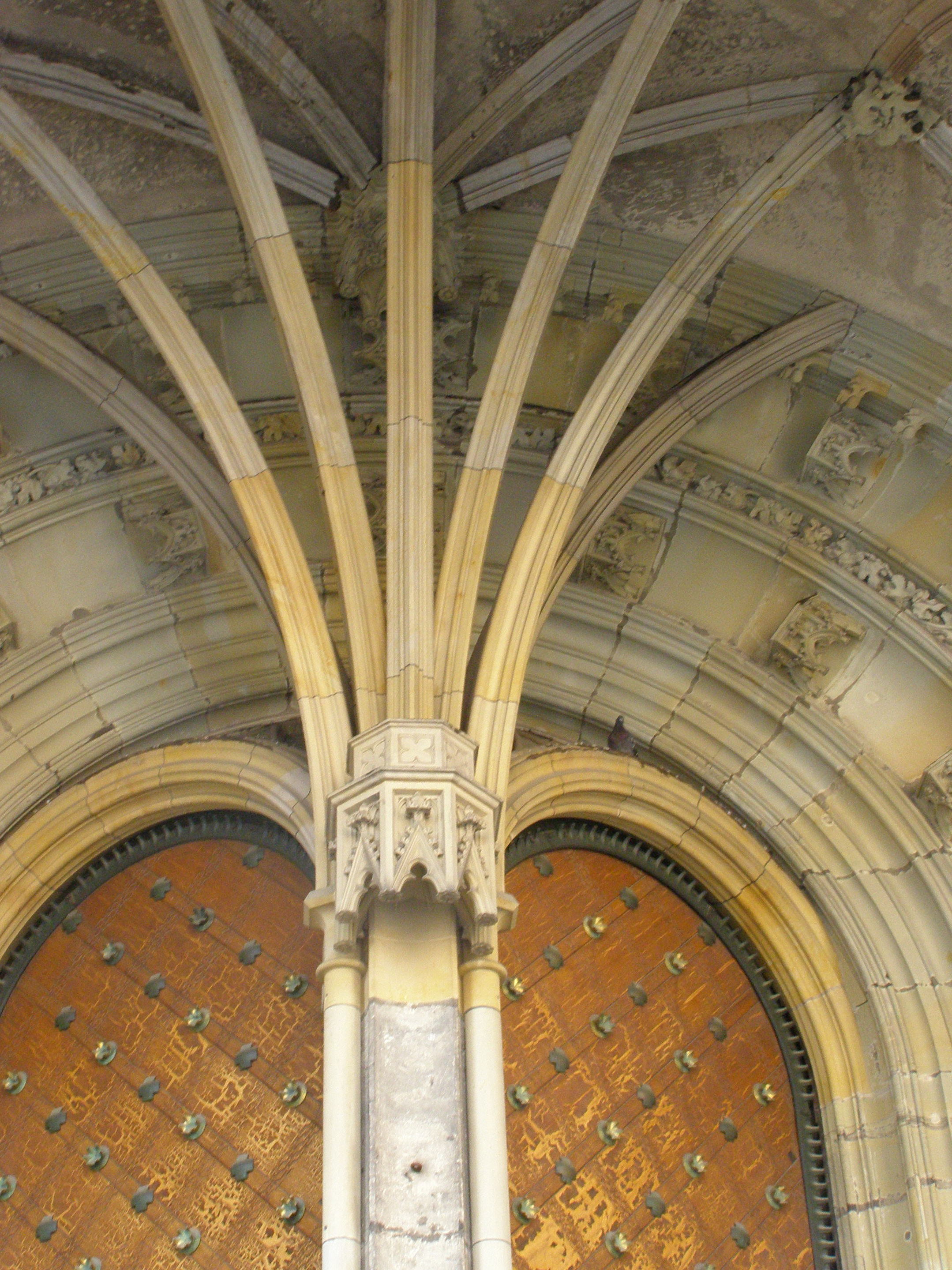 Praha, Katedrála svatého Víta, Václava a Vojtěcha, Zlatá brána